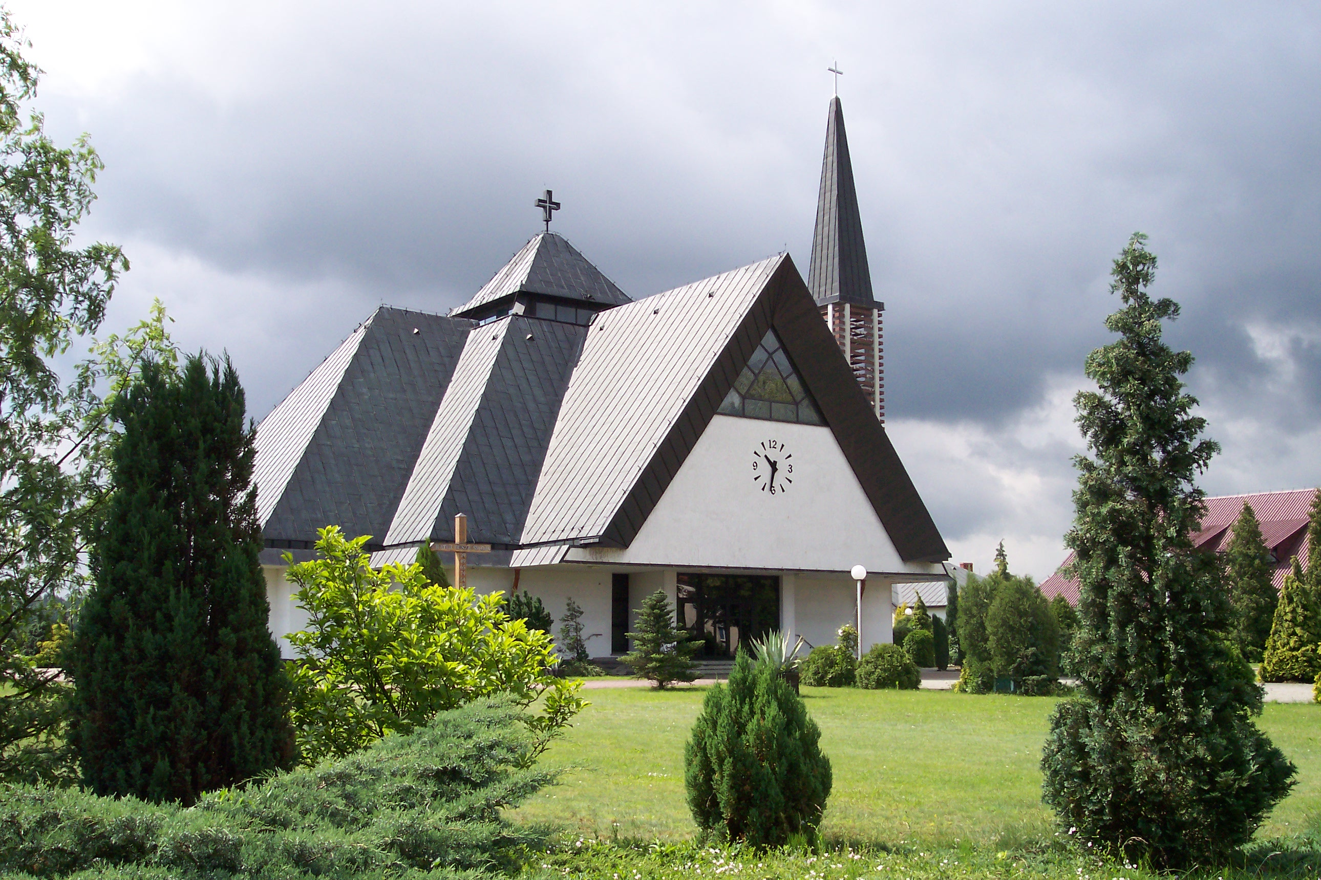 Kościół w Ciasnej